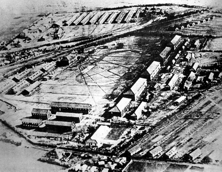 鉄道第2連隊全景。中央の鉄道（左方向が至東京）を挟んで写真上側は鉄道連隊材料廠舎（旧千葉県立千葉工業高校校舎敷地。現イオン津田沼ショッピングセンター、イトーヨカドー津田沼店等）、下部は鉄道第2連隊営舎（現千葉工業大学校舎敷地）。